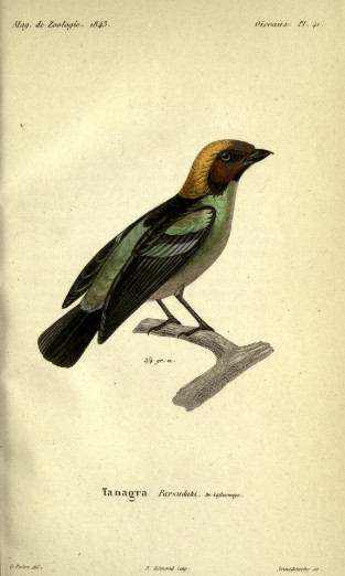 Mag. de Zoologie 1843, Oiseaux Pl 41, Tangara Parzudakii De Lafresnaye, Pêtre, pinx., N. Rémond imp., Annedouche sc.